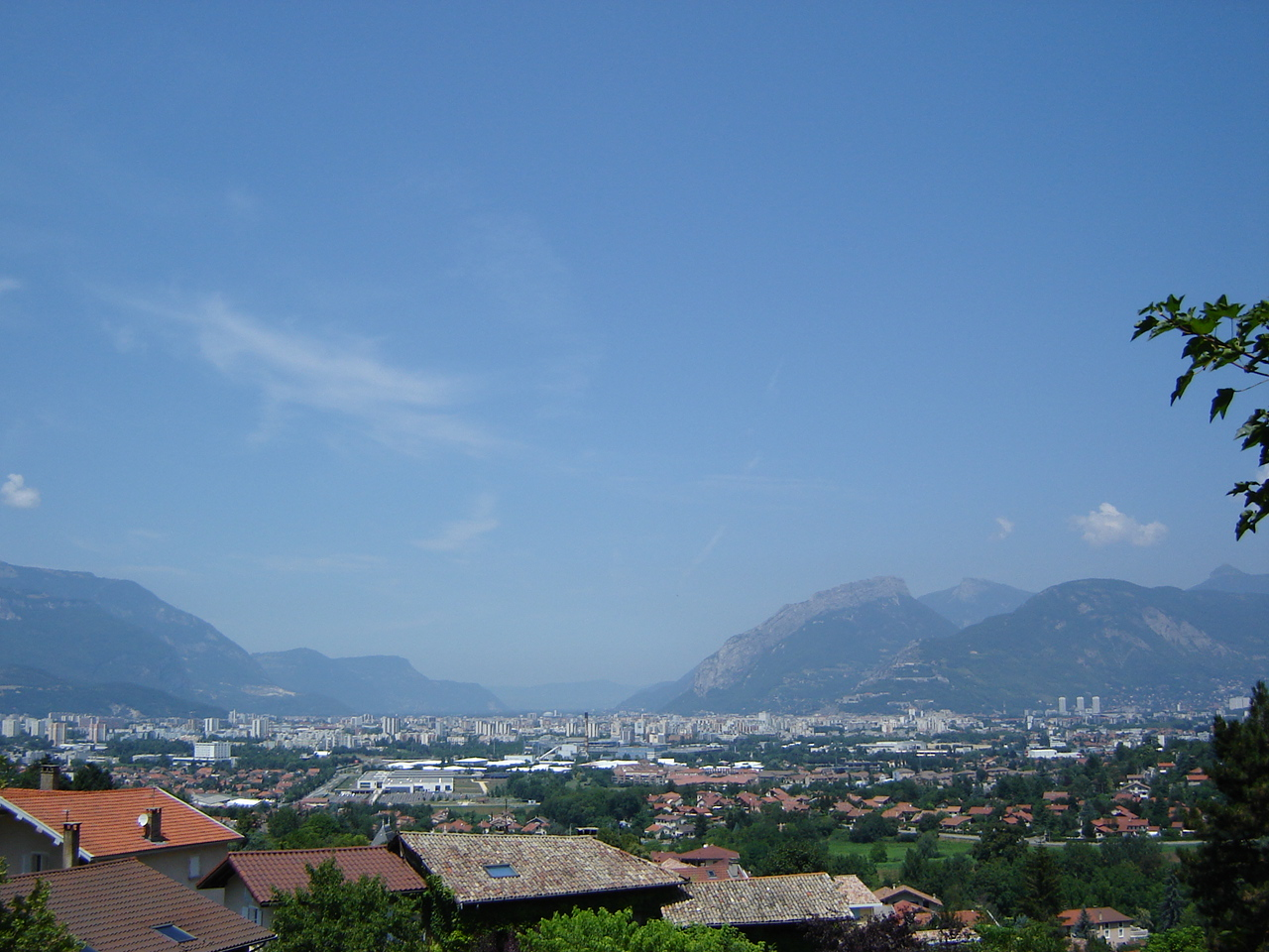 Description:Grenoble vu depuis Bresson, à gauche le Vercors, à droite la Chartreuse. Auteur:Rémih Date:14 juillet 2006